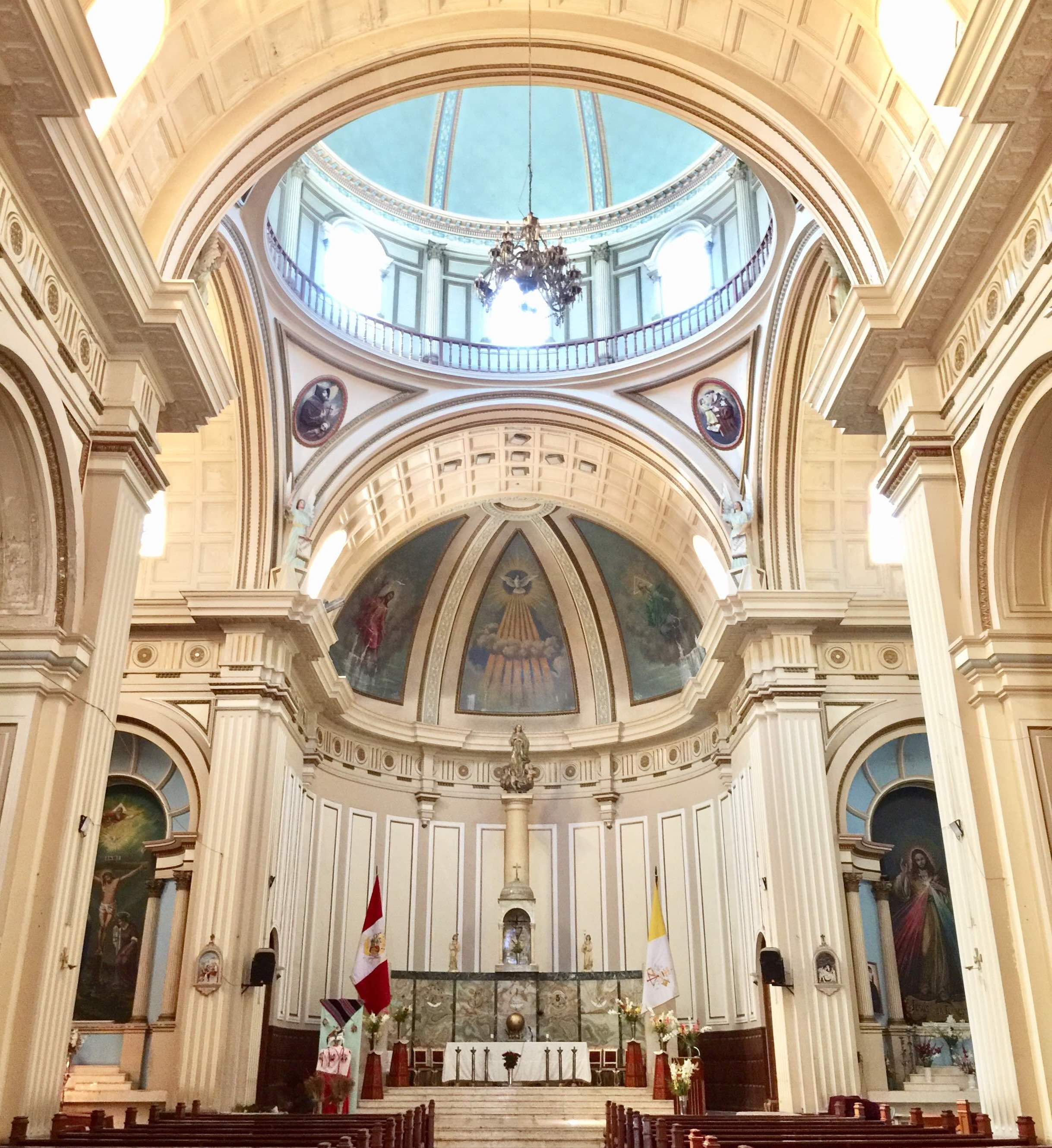 Altar mayor y Nave principal de la Iglesia.